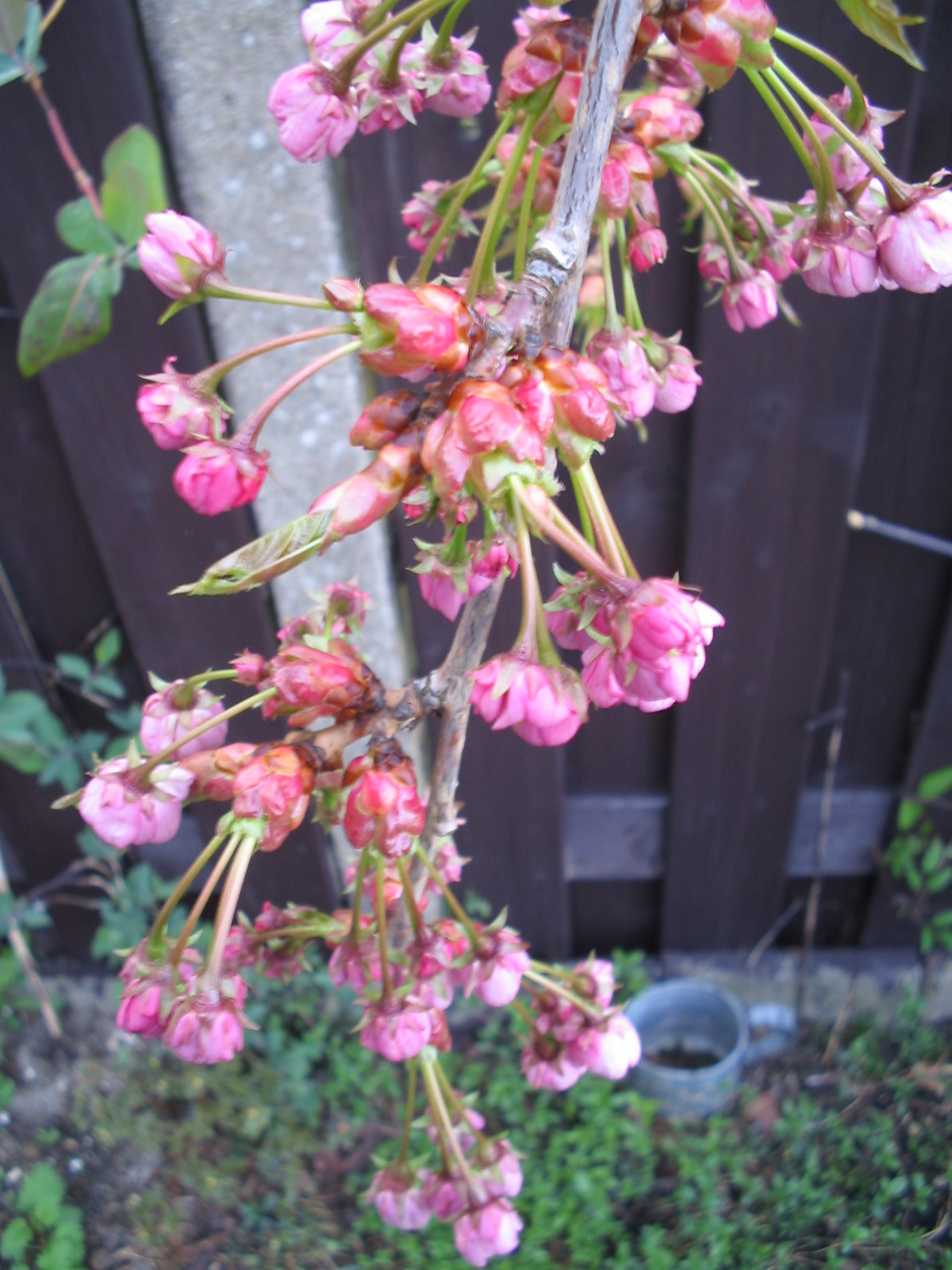 Prunus serrulata, april 2005